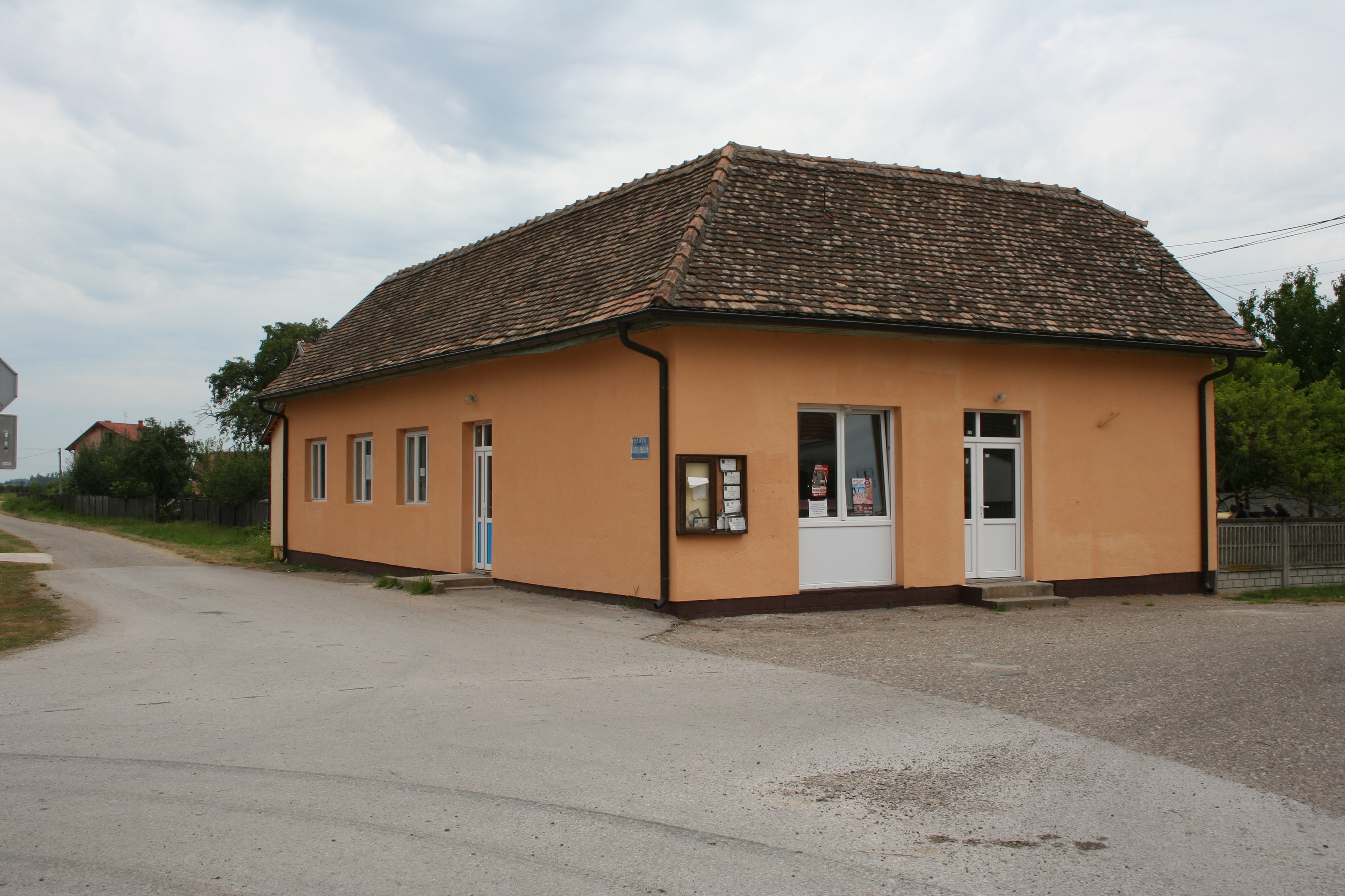 Zgrada MZ, Skrađani